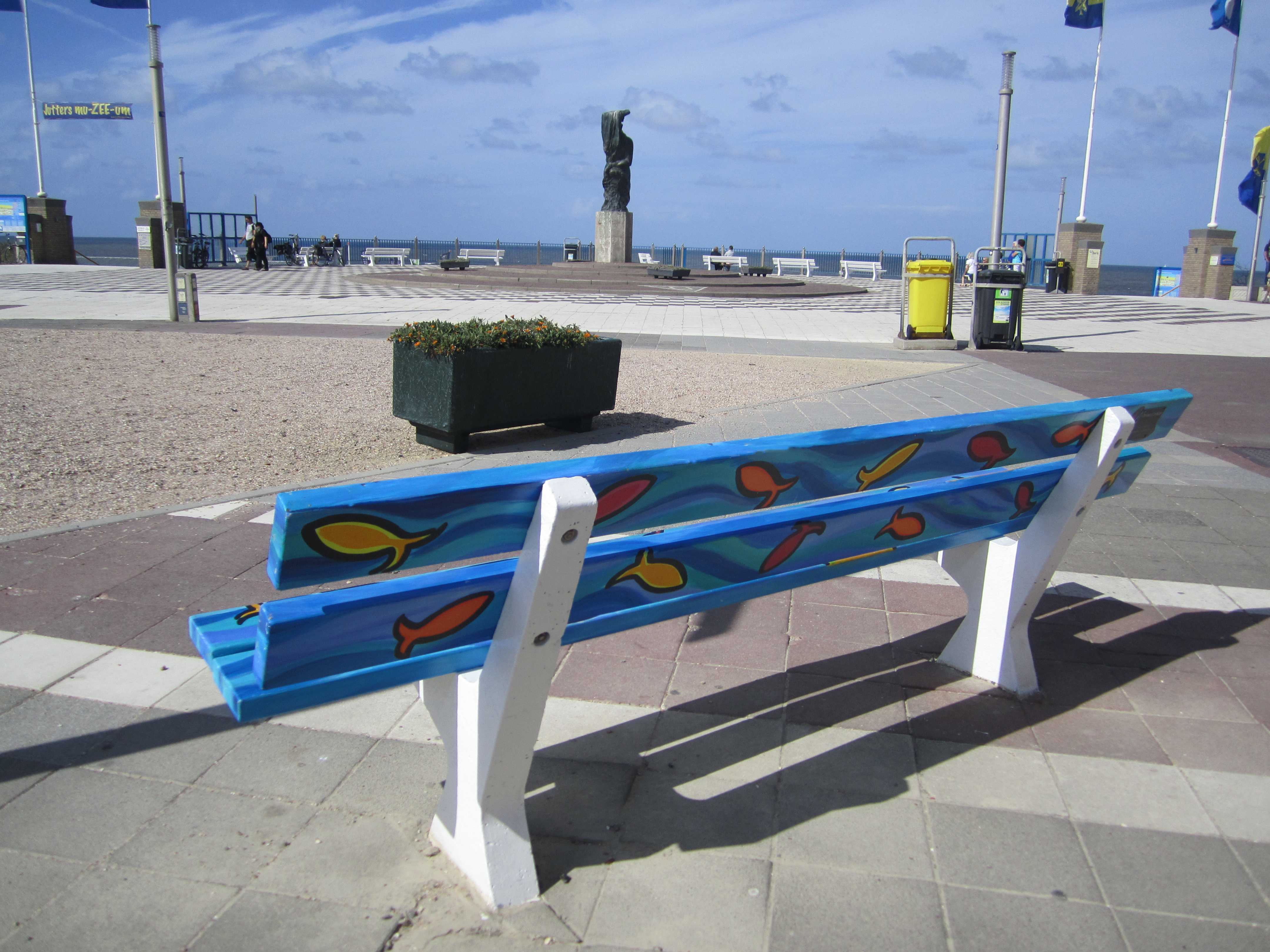 Kunstbankje van Donna Corbani bij Boulevard de Favauge in Zandvoort